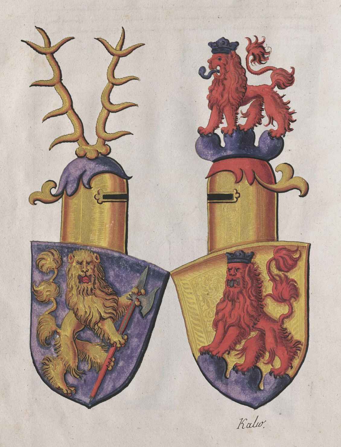 Wappen aus der Zimmerischen Chronik, Handschrift B, Württembergische Landesbibliothek Stuttgart, Cod. Don. 580a, S. 30, Allianzwappen Zimmern / Calw